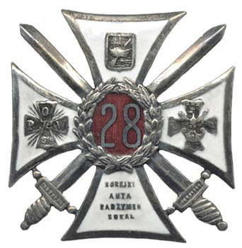 Odznaka oficerska 28 Pułku Strzelców Kaniowskich